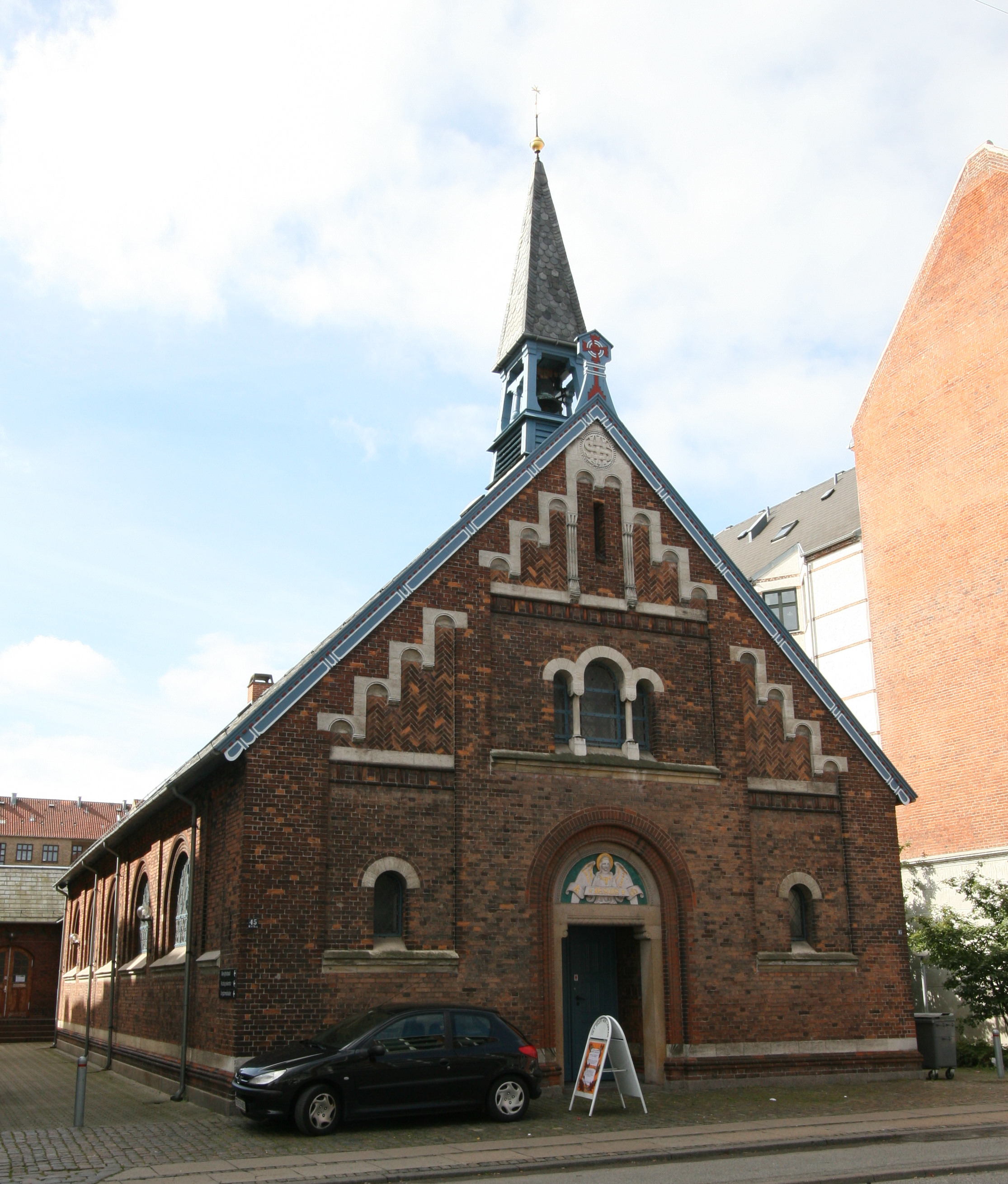 Kapernaumskirken, Copenhagen, Denmark. Kapernaumskirken